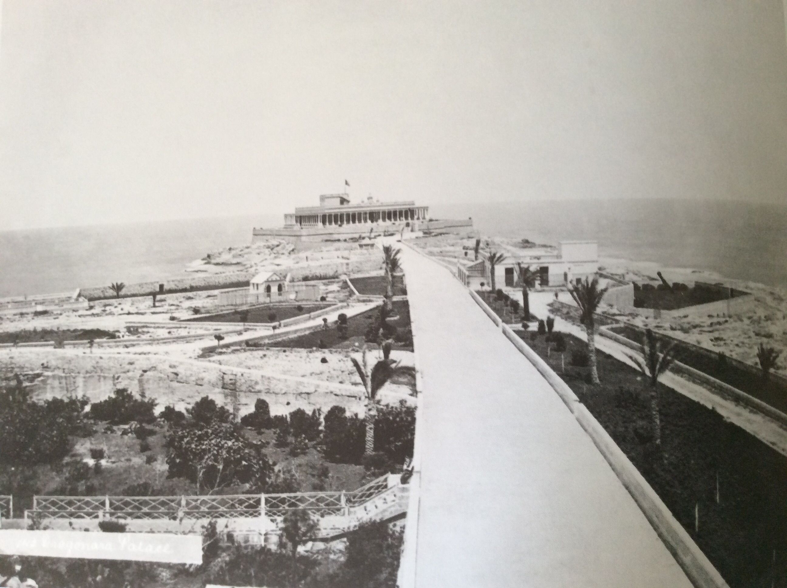 Dragonara Palace St. Julian's Malta ogrody i droga dojazdowa XIX/XX w.